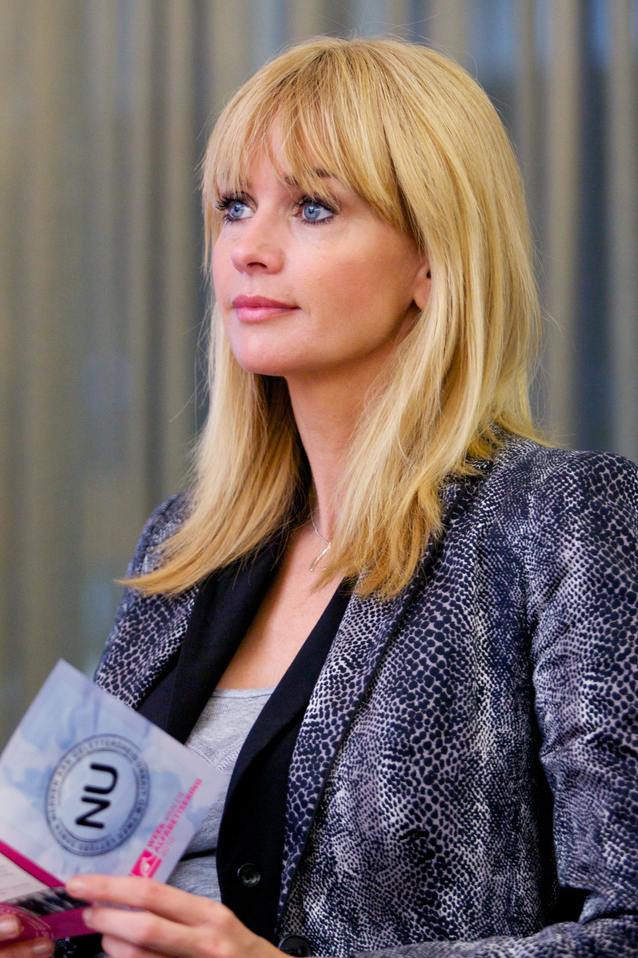 Ondertekening convenant Flora Holland voor de Week van de Alfabetisering.